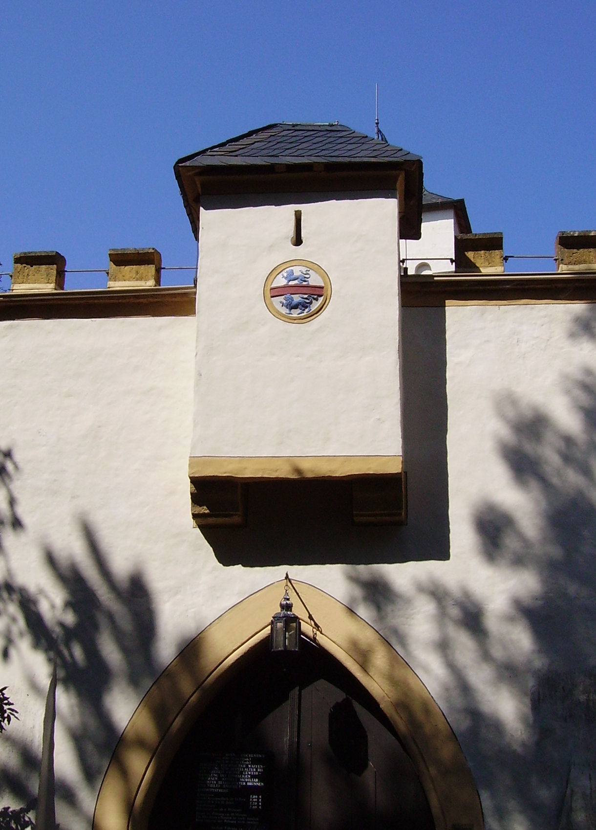 Greifenstein Castle near Heiligenstadt in (Franconia)